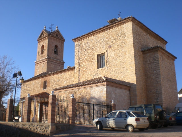 Iglesia Parroquial Santa María Magdalena de Villamuelas